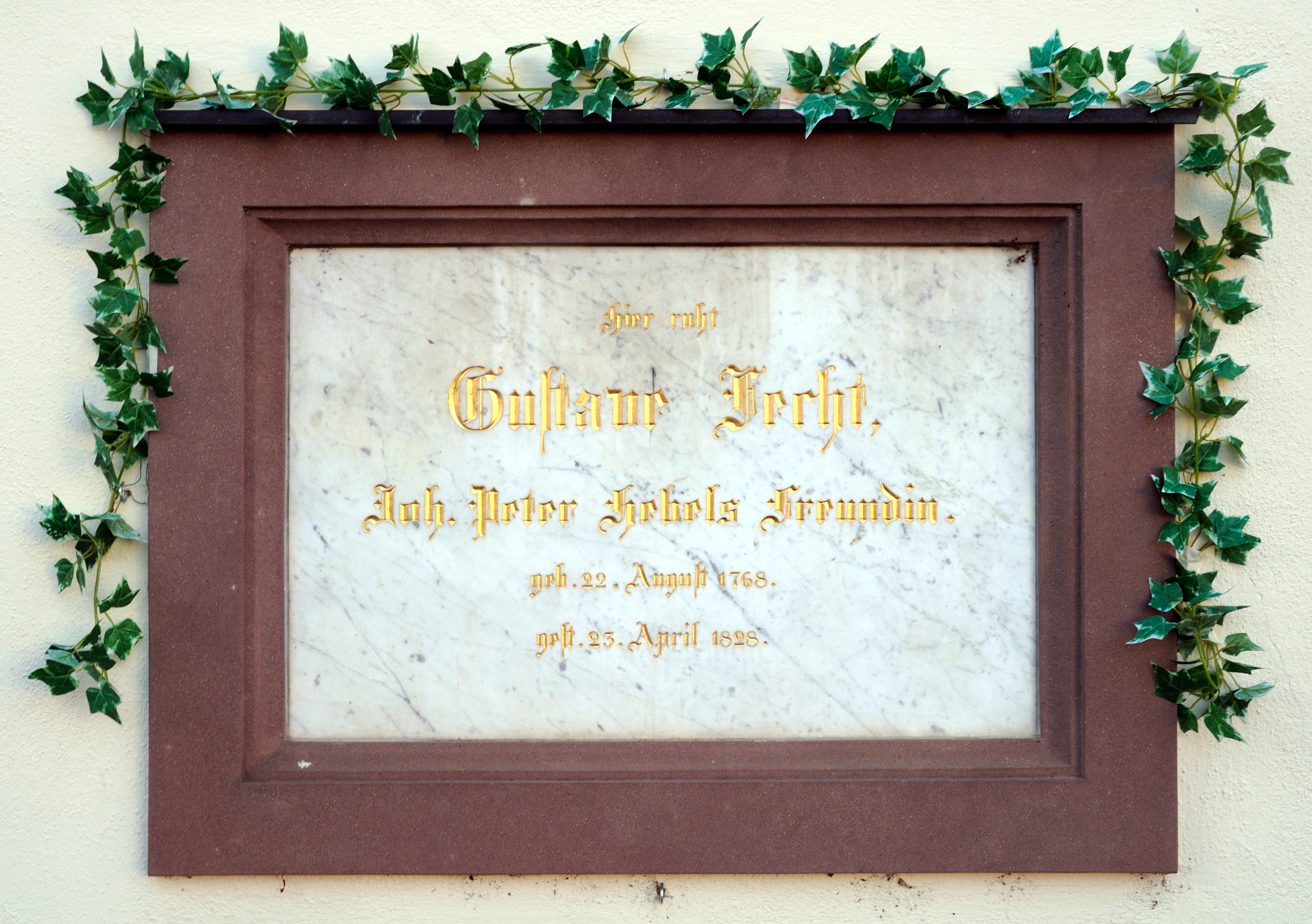 Weil am Rhein: Evangelische Kirche Alt-Weil, Gedenktafel